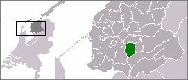 Self made map of the municipality of Haskerland in 1933.